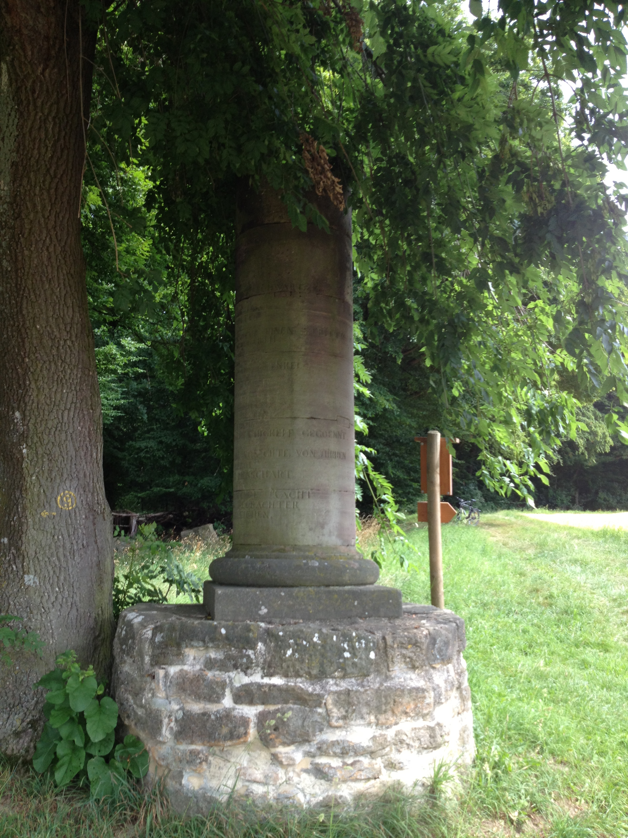 Kassel-Steig nahe Gut Windhausen